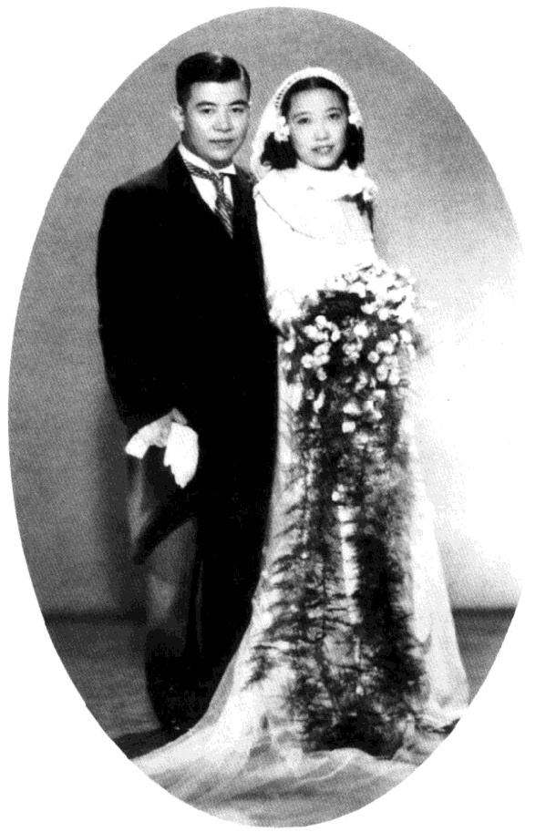 中文（台灣）: 吳大猷與夫人